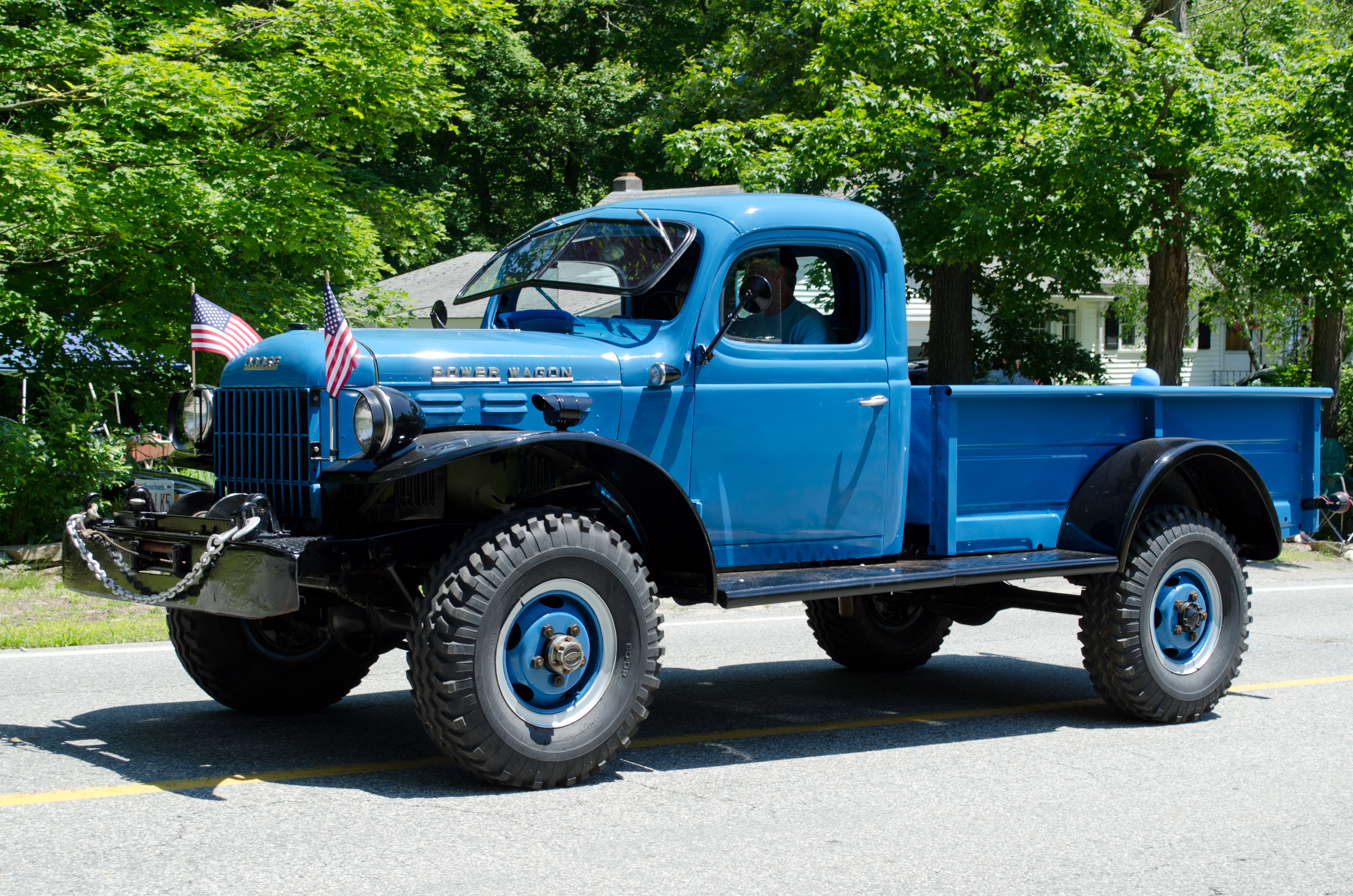 Berlin Bicentennial Parade